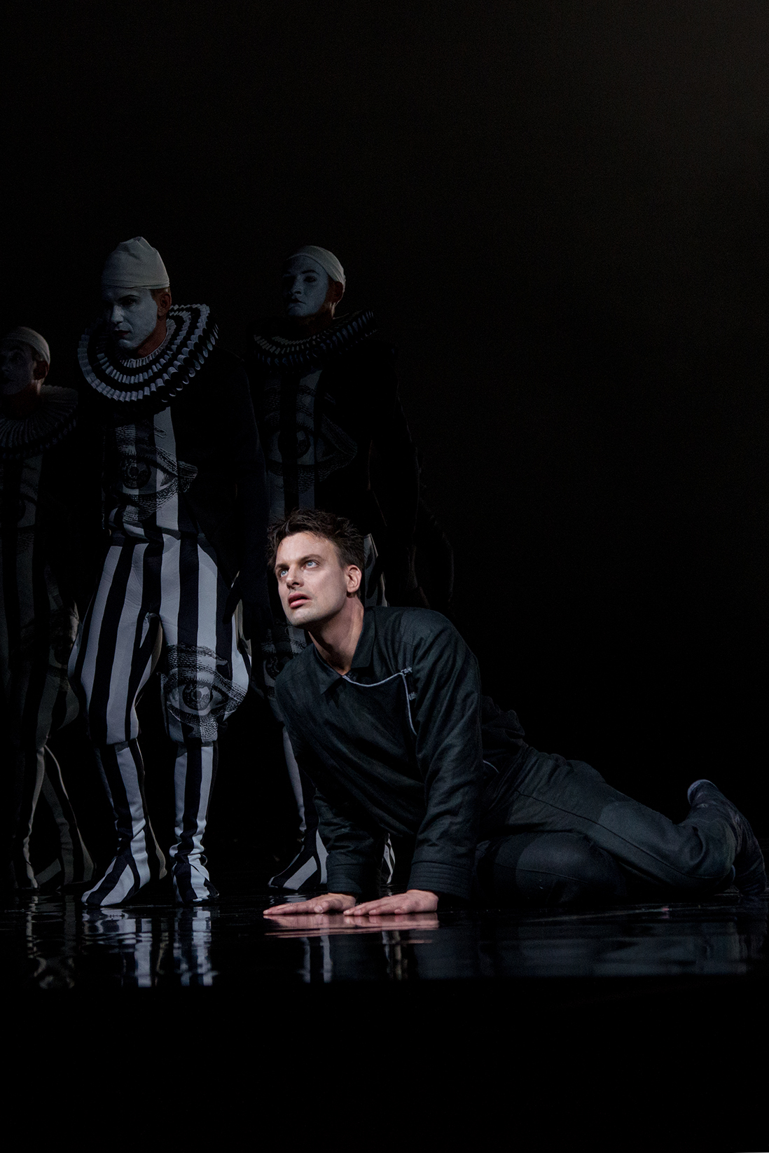 Hamlet von Franco Faccio